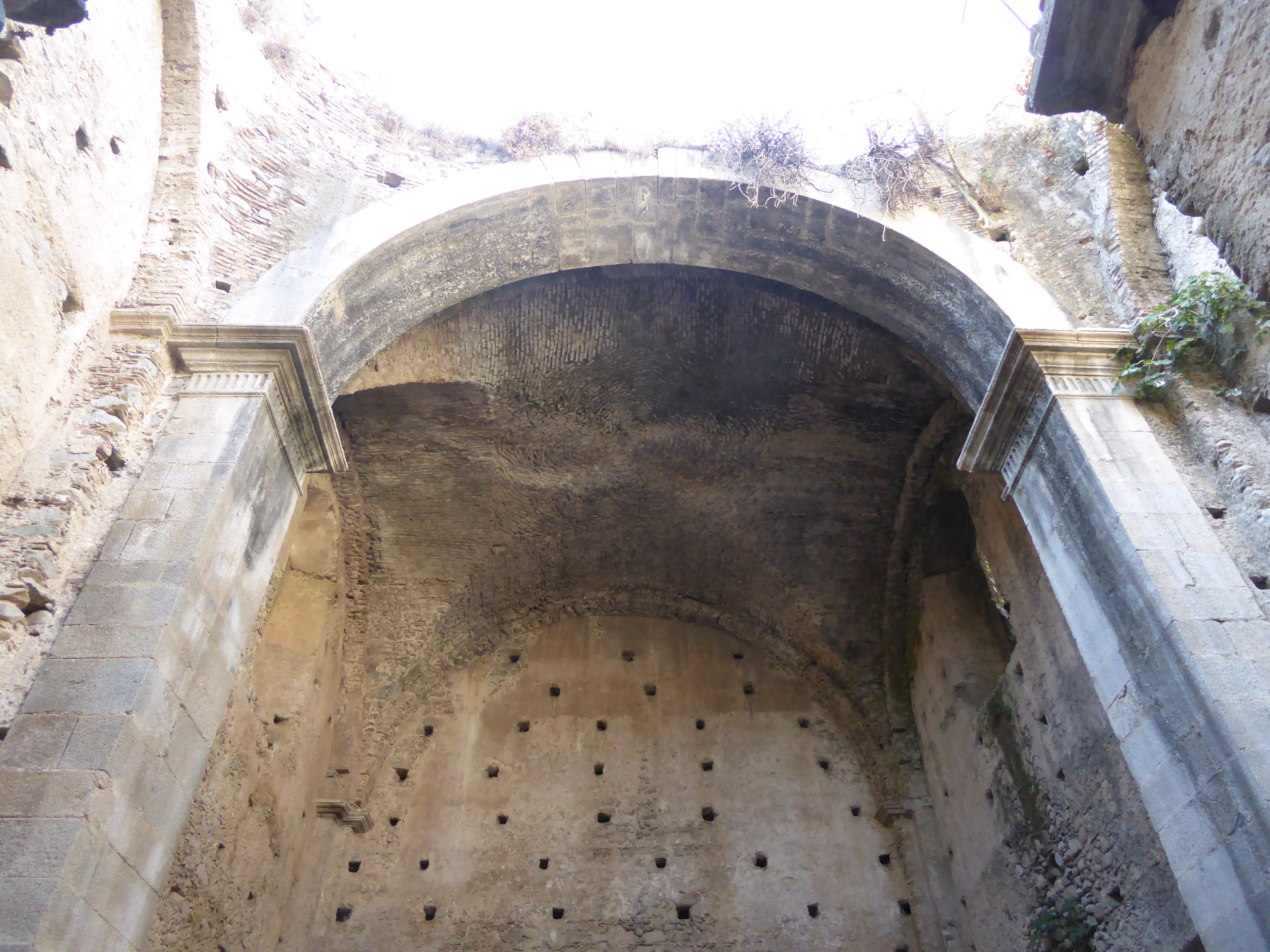 Cantina o Palazzo San Carlo ed ex palazzo Sirleto a Guardavalle (agosto 2019)